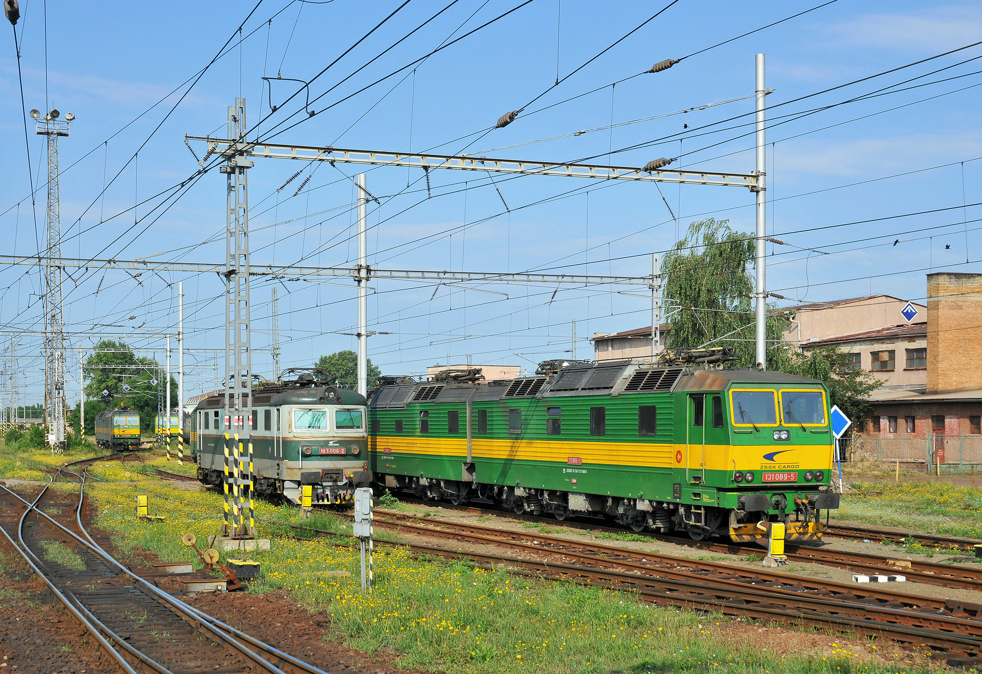 Elektrické lokomotivy 131.089 a 183.008 ZSSK Cargo v depu Čierna nad Tisou.